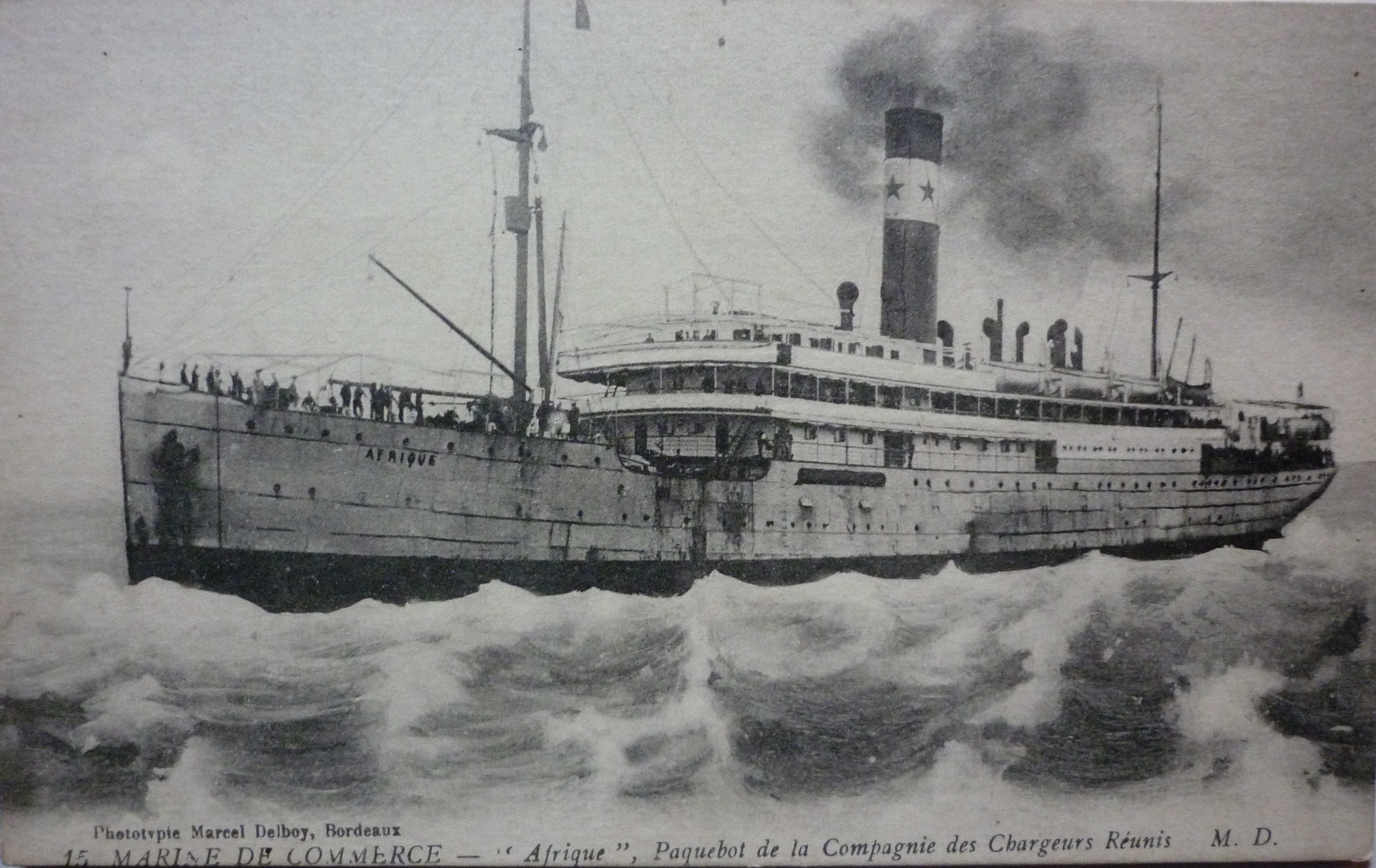 Paquebot Afrique à Bordeaux vers 1910, carte postale, phototypie Marcel Delboy, Bordeaux